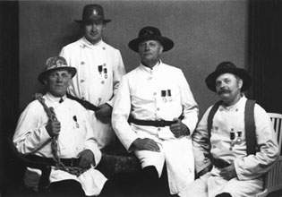 Delar av Ystads Frivillige Bergnings-Corps med nya uniformer. Från vänster: August Wallentinsson, Johan Svärd, John Dahlqvist, Manne Nordström